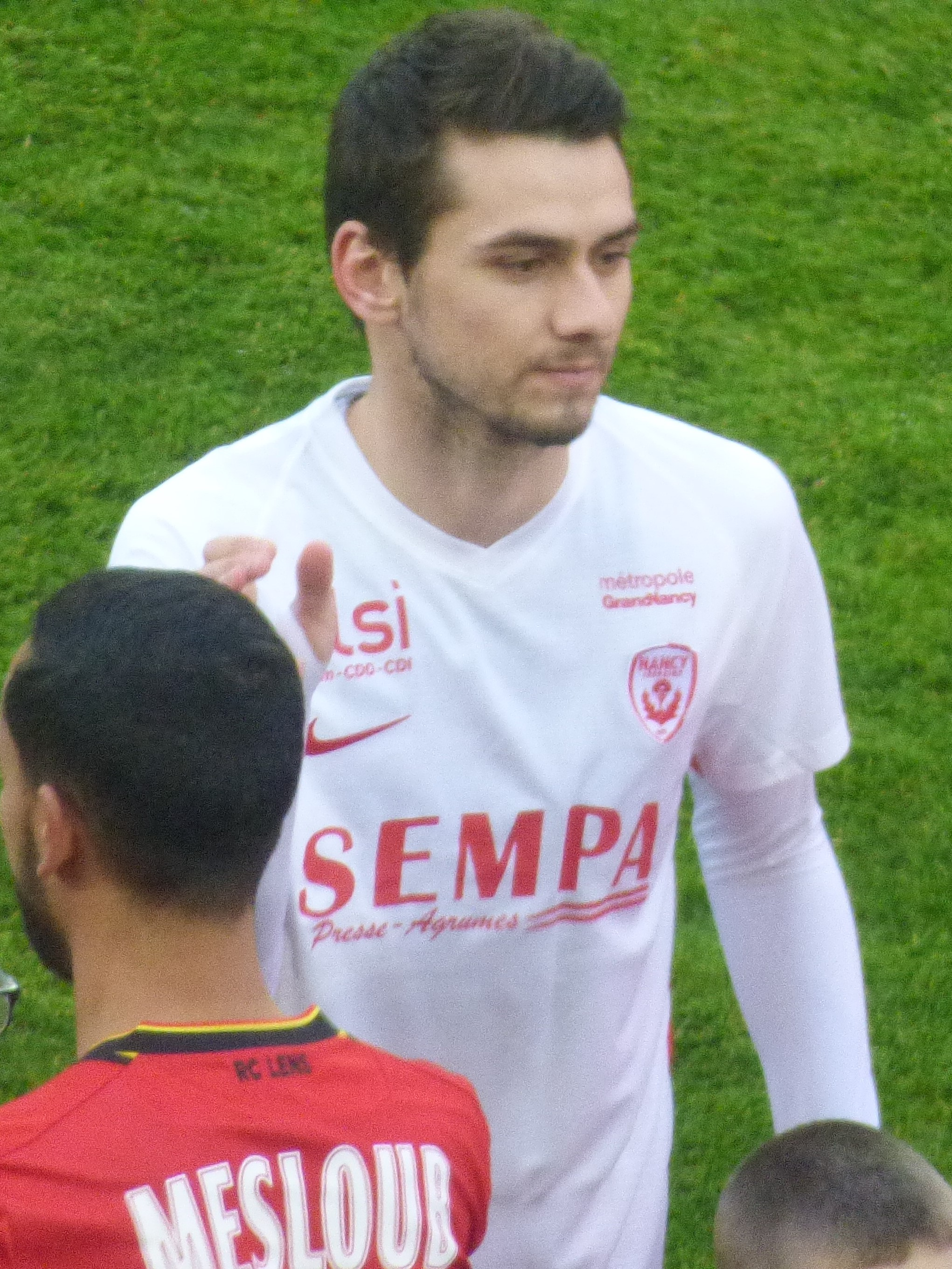 Vincent Marchetti avant le match RC Lens / AS Nancy-Lorraine, comptant pour la vingt-et-unième journée du championnat de France de football de Ligue 2 2018-2019, le 19 janvier 2019, au Stade Bollaert-Delelis de Lens.